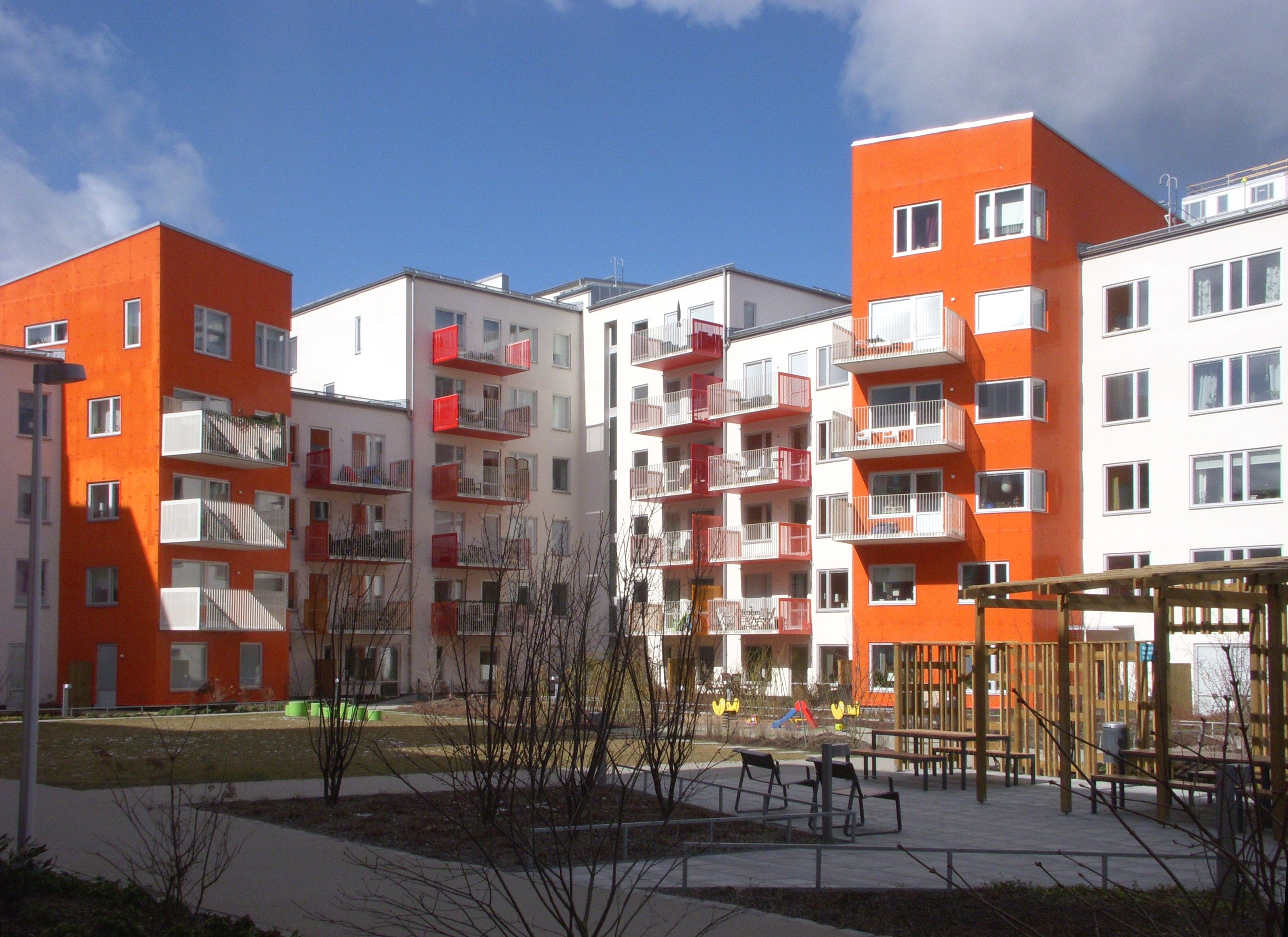 Bostadsområdet Annedal i Stockholm